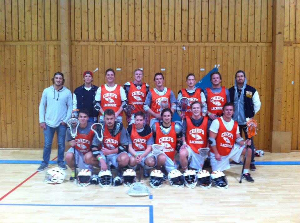 BI Bergen Chiefs Lacrosse 1. lag ved BC 2012